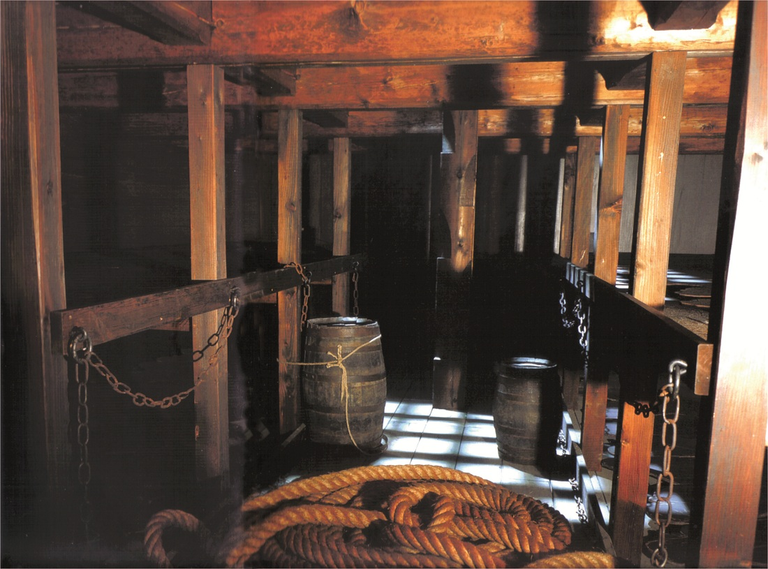 salle et scénographie consacrée à un entrepont de navire négrier dans l'exposition "Les Anneaux de la Mémoire", Nantes (France), château des Ducs de Bretagne